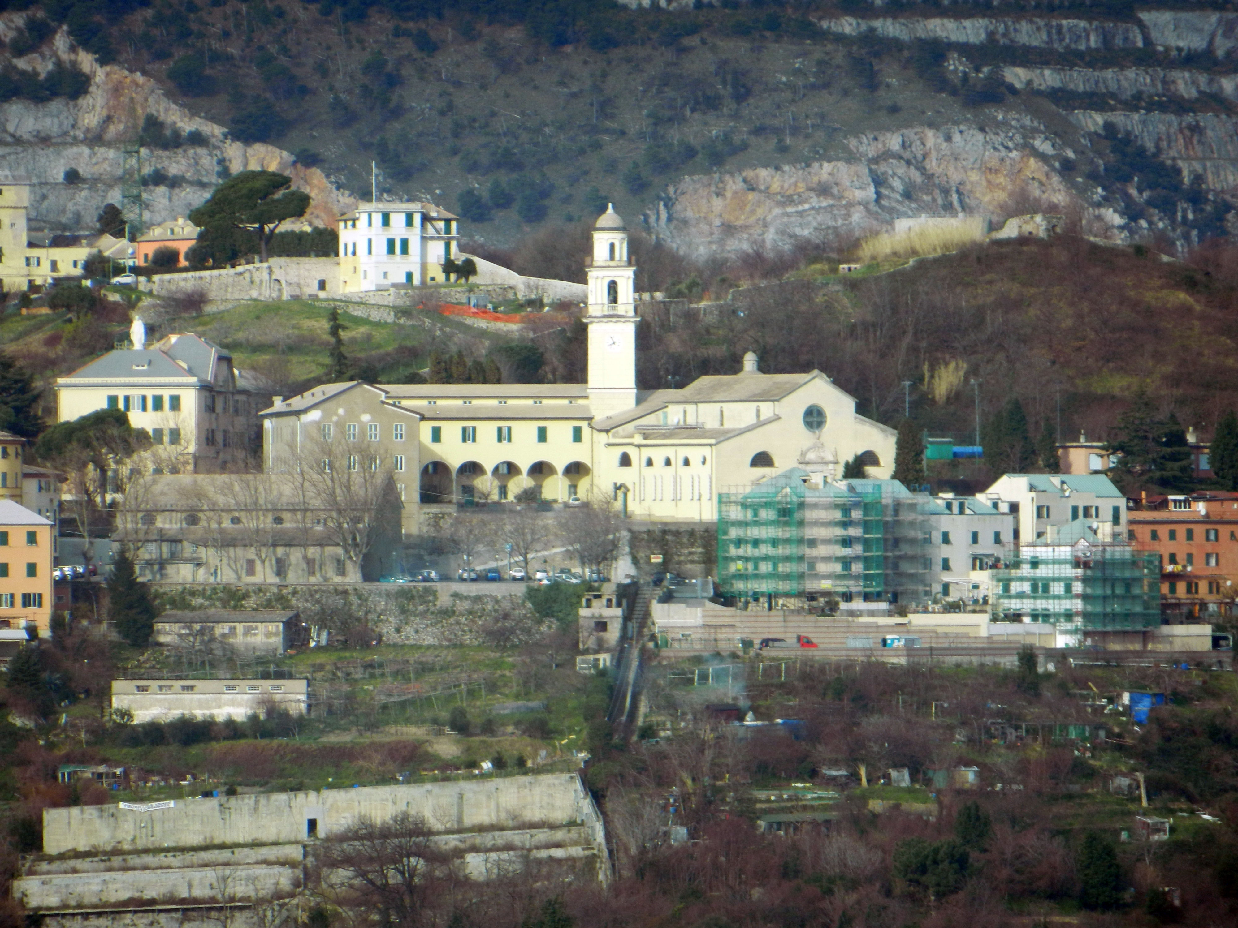 Genova, quartiere di Corniglano, la chiesa di San Michele Arcangelo sulla collina di Coronata